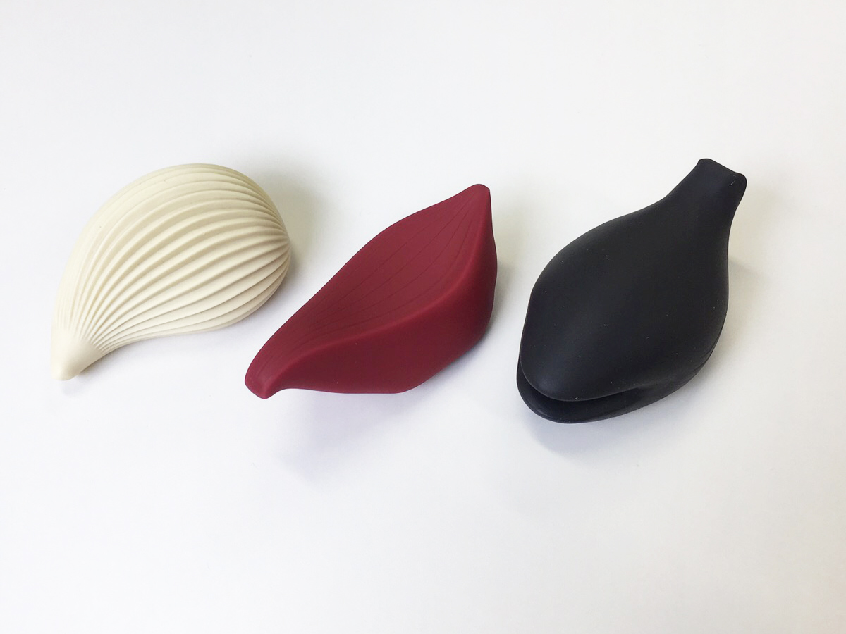 irohamini